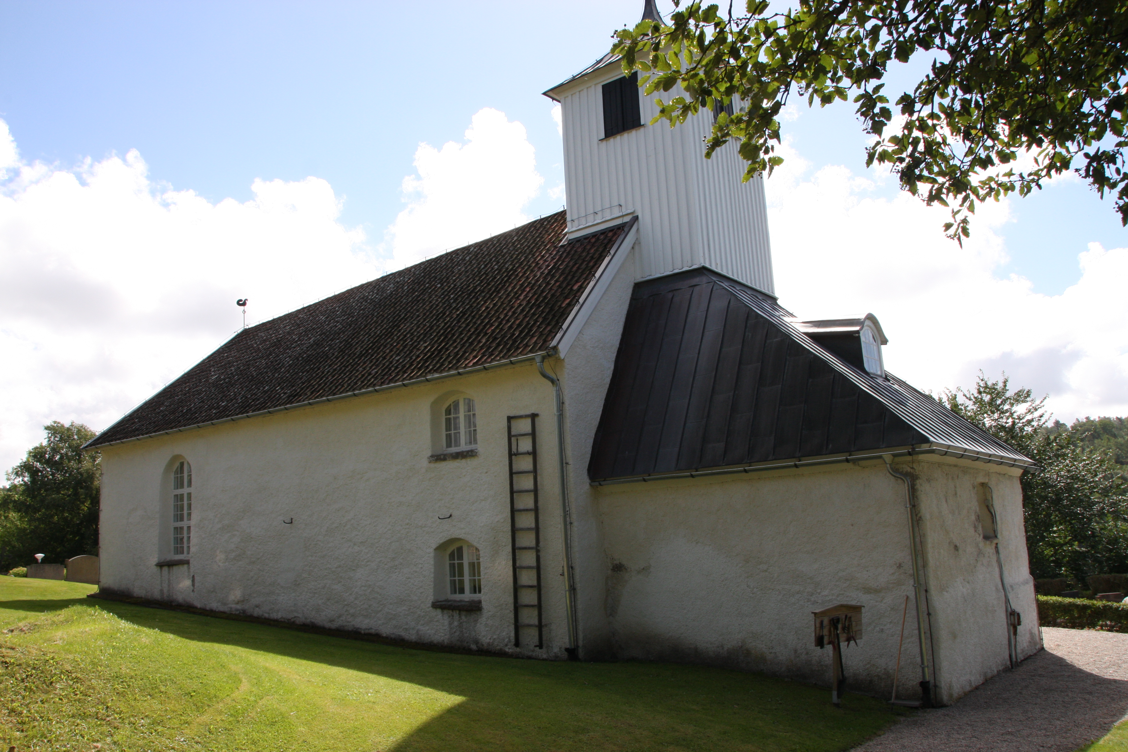 Bottna kyrka i Tanums kommun, Bohuslen.